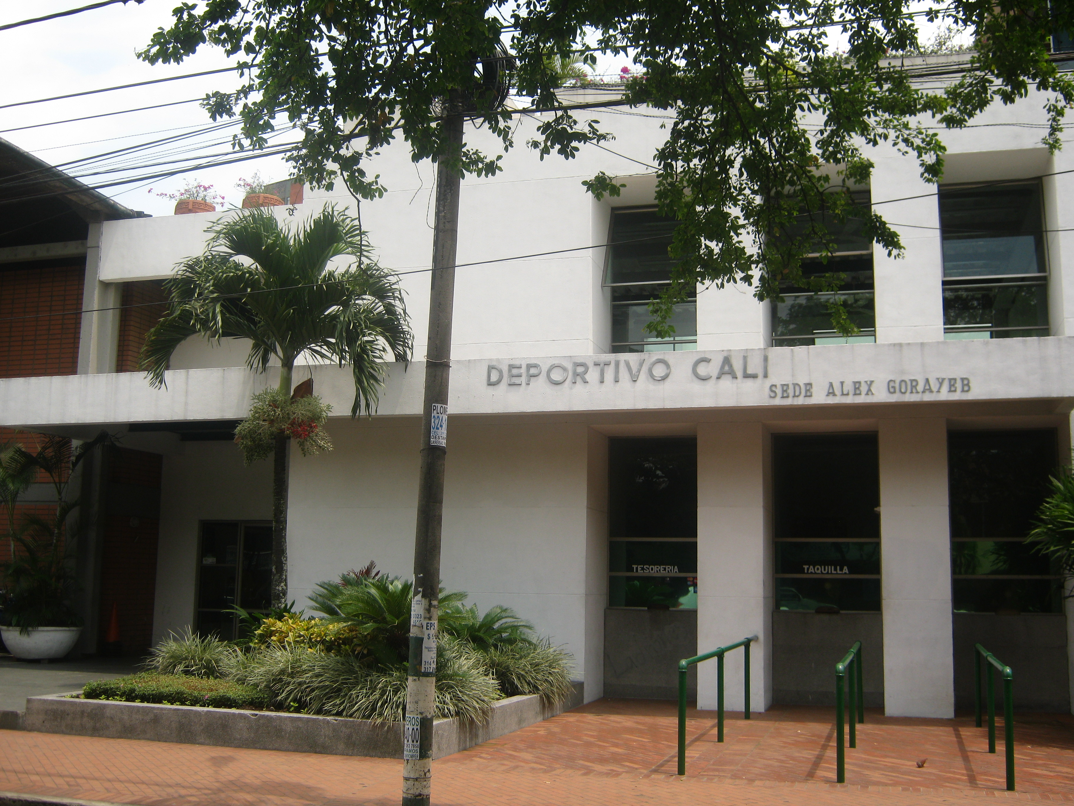 Entrada y Taquilla de la sede Alex Gorayeb del Deportivo Cali